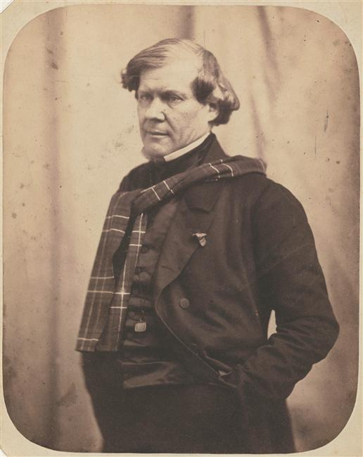 Paul Lacroix, dit le "Bibliophile Jacob". Photographie de Félix Nadar, XIXe siècle.